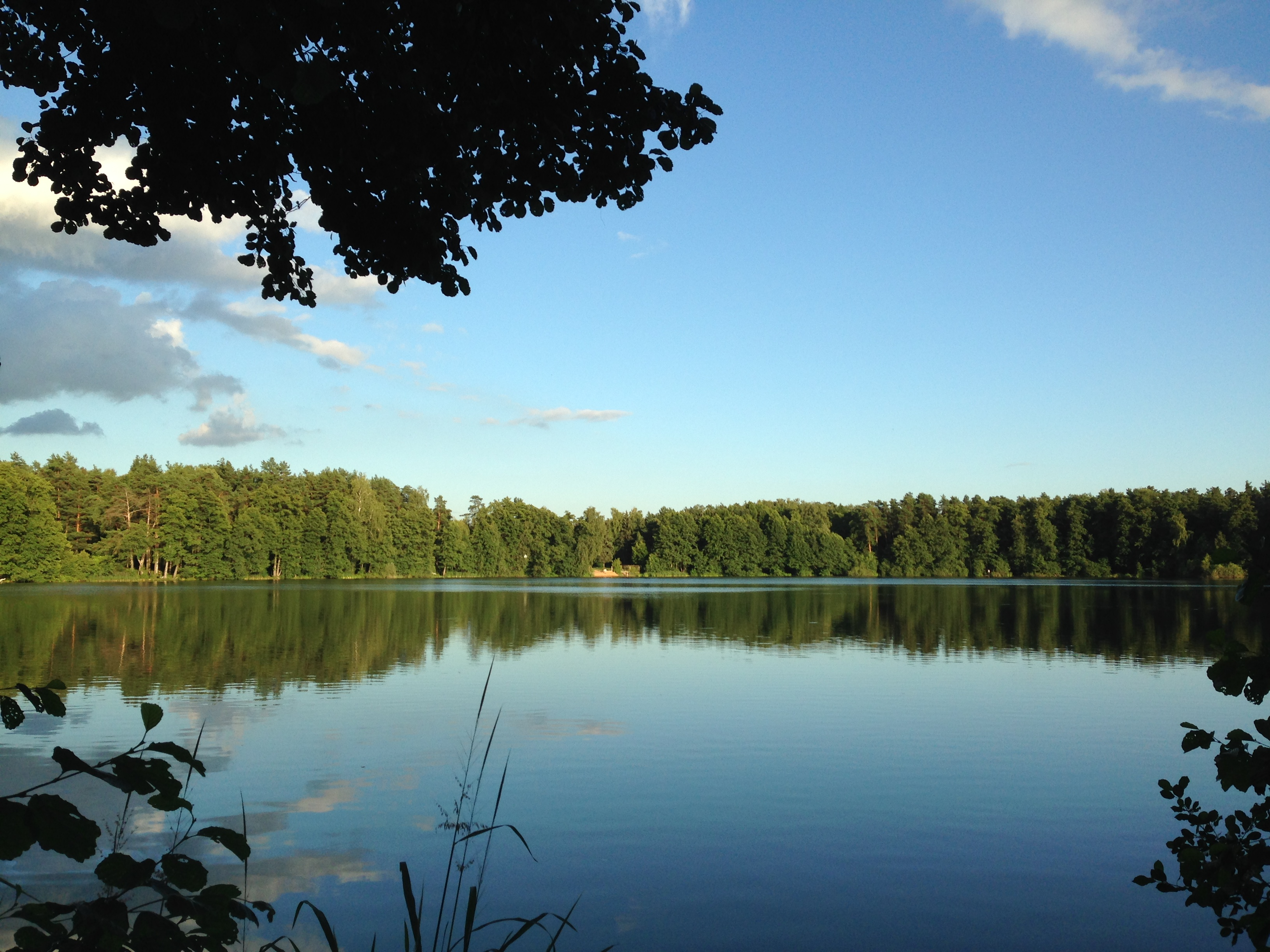 Белое озеро, Воскресенский район